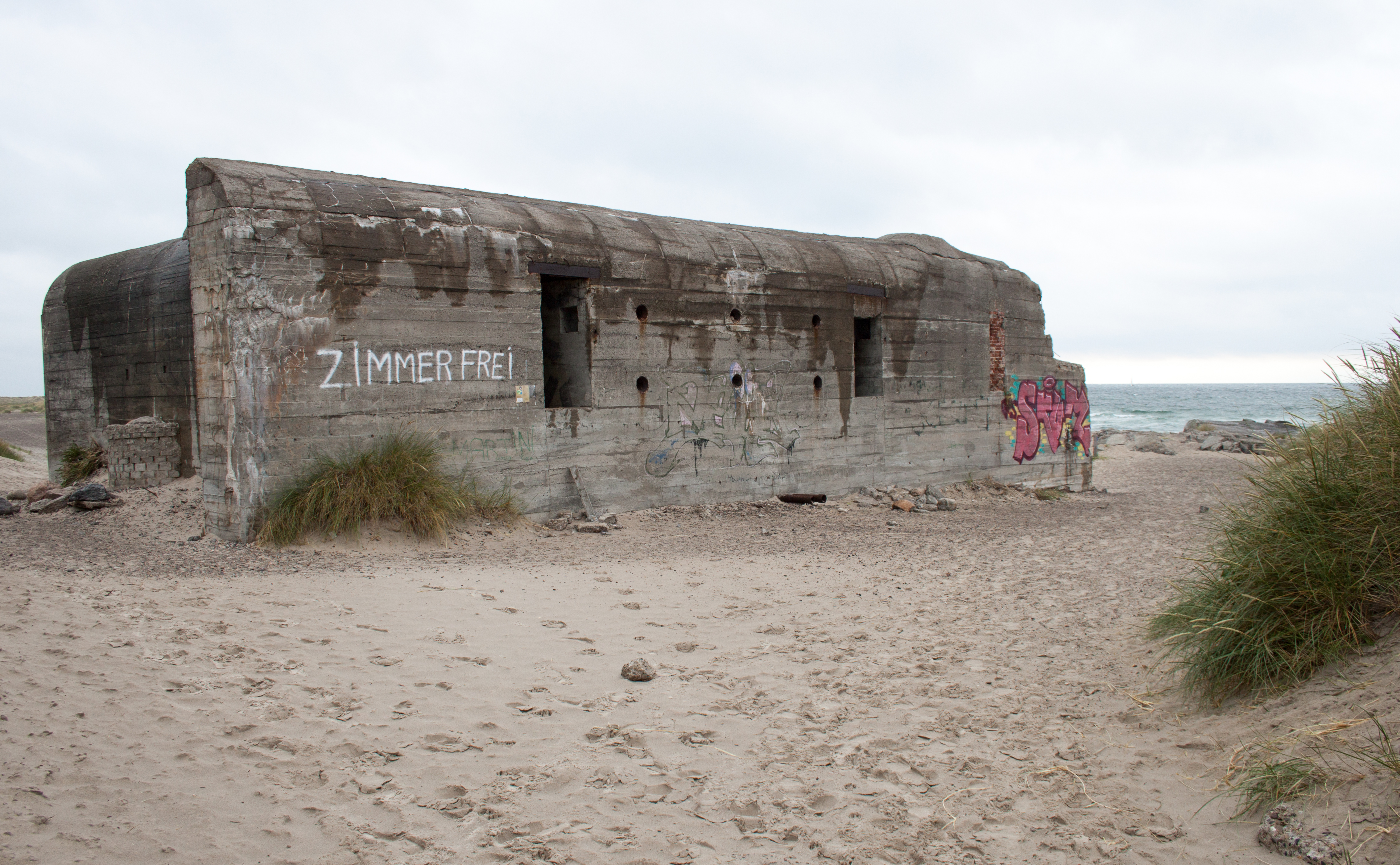 Grenen, bunkerlabel QS:Len,"Grenen, bunker"